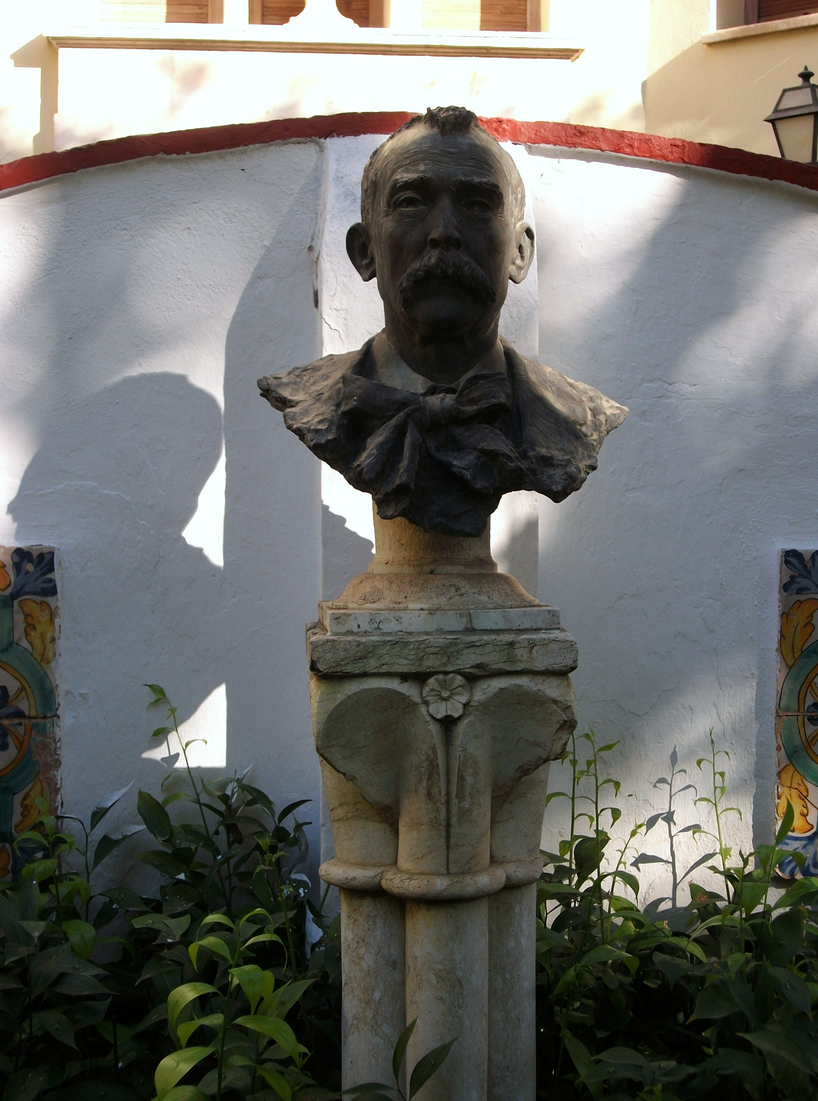 Busto en bronce de Juan Antonio Benlliure y Tomás padre de los Benlliure, obra de Mariano en 1894, que usó a su padre como modelo para la estatua de Antonio Trueba, que se esculpió finalmente en 1904, aunque no se fundió en bronce hasta 1908, ya muerto el cabeza de familia. Se encuentra en el jardín de la casa-museo de la familia Benlliure. [1]